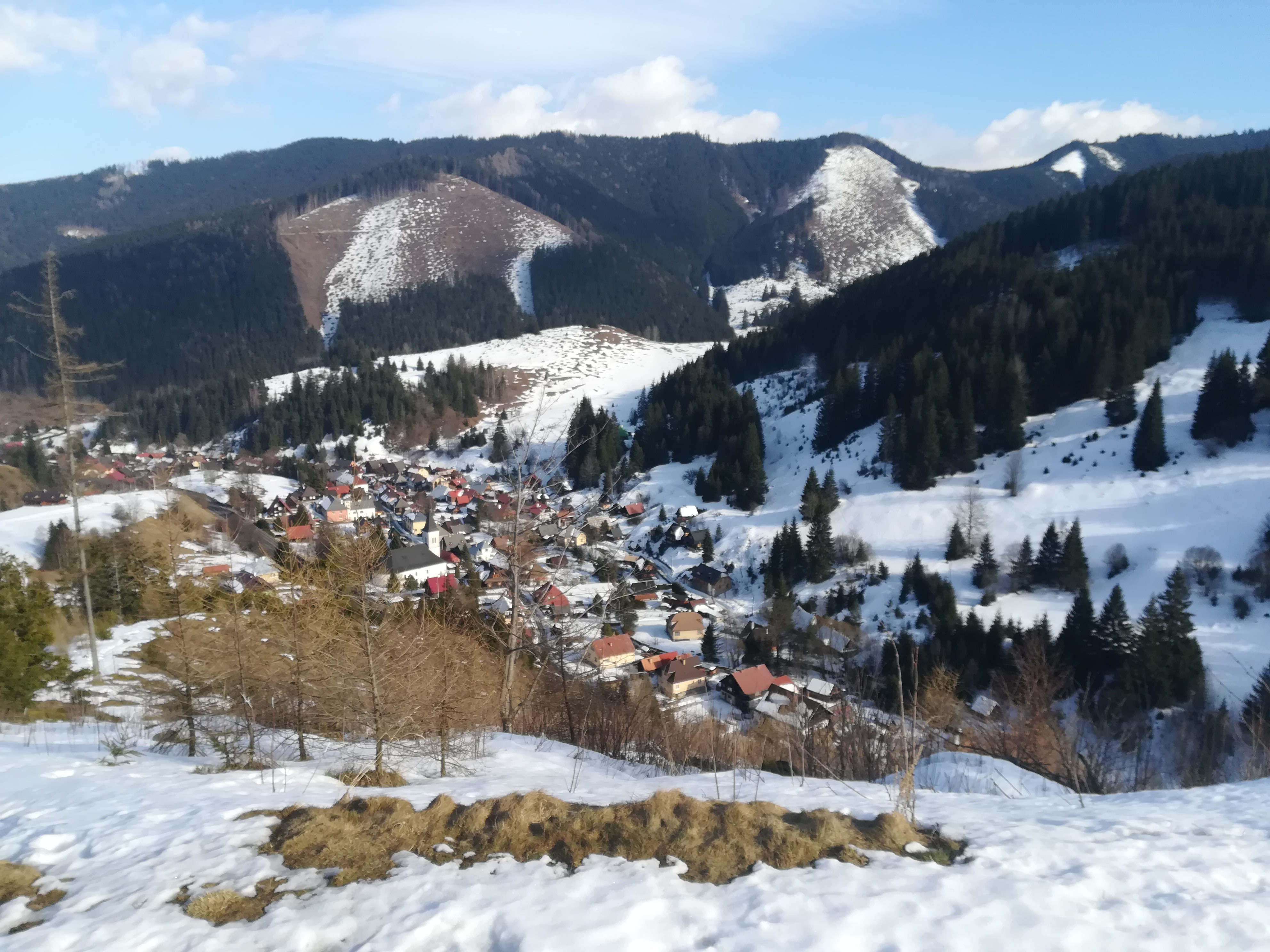 Pohľad na Nižnú Bocu v zime